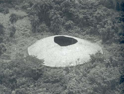 Yanomami, Toototobi, 1961 René Fuerst